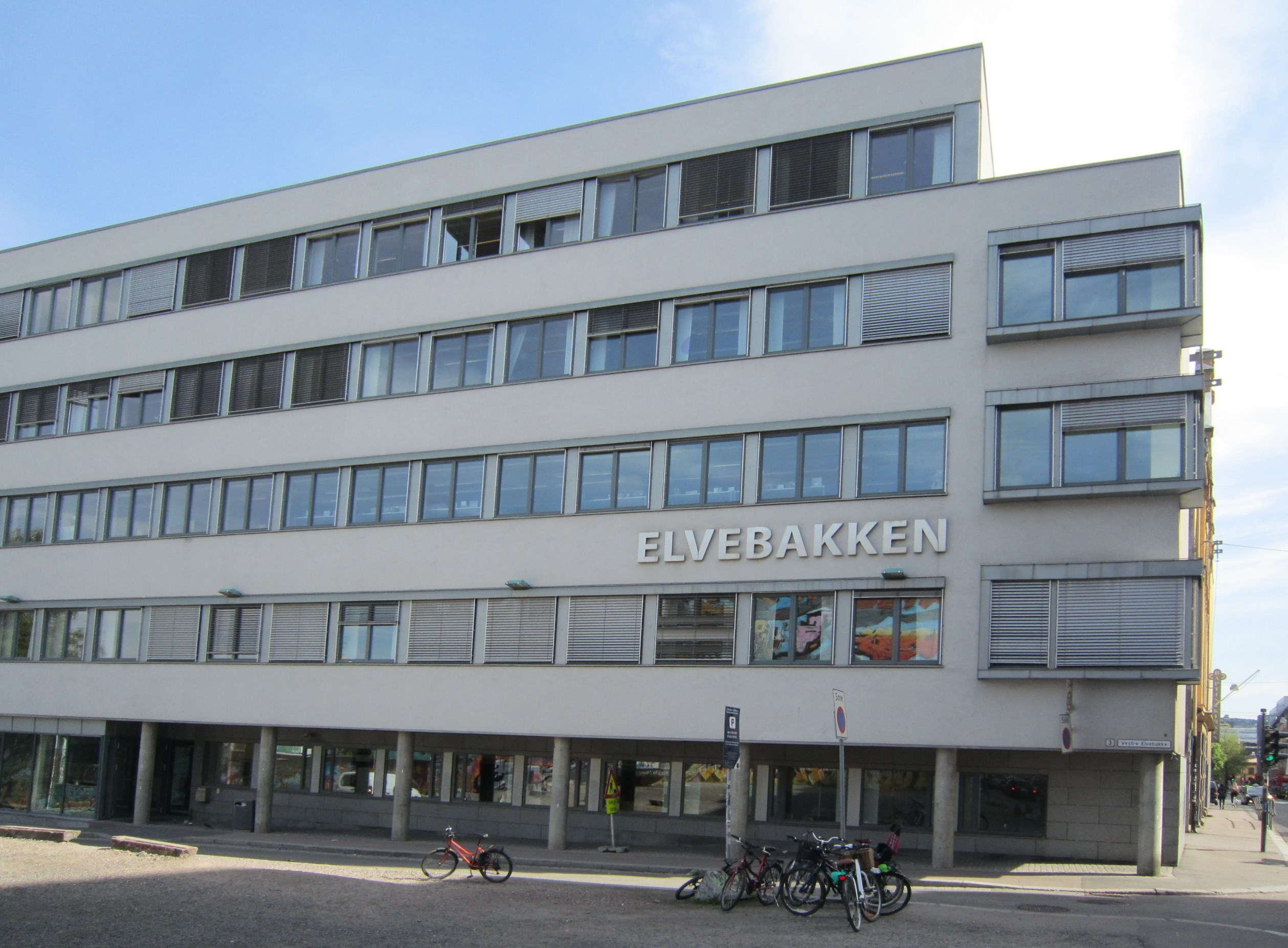 Elvebakken VGS i Vestre Elvebakke i Oslo